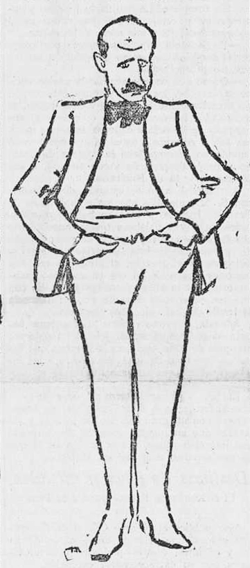 Ignacio Zuloaga.